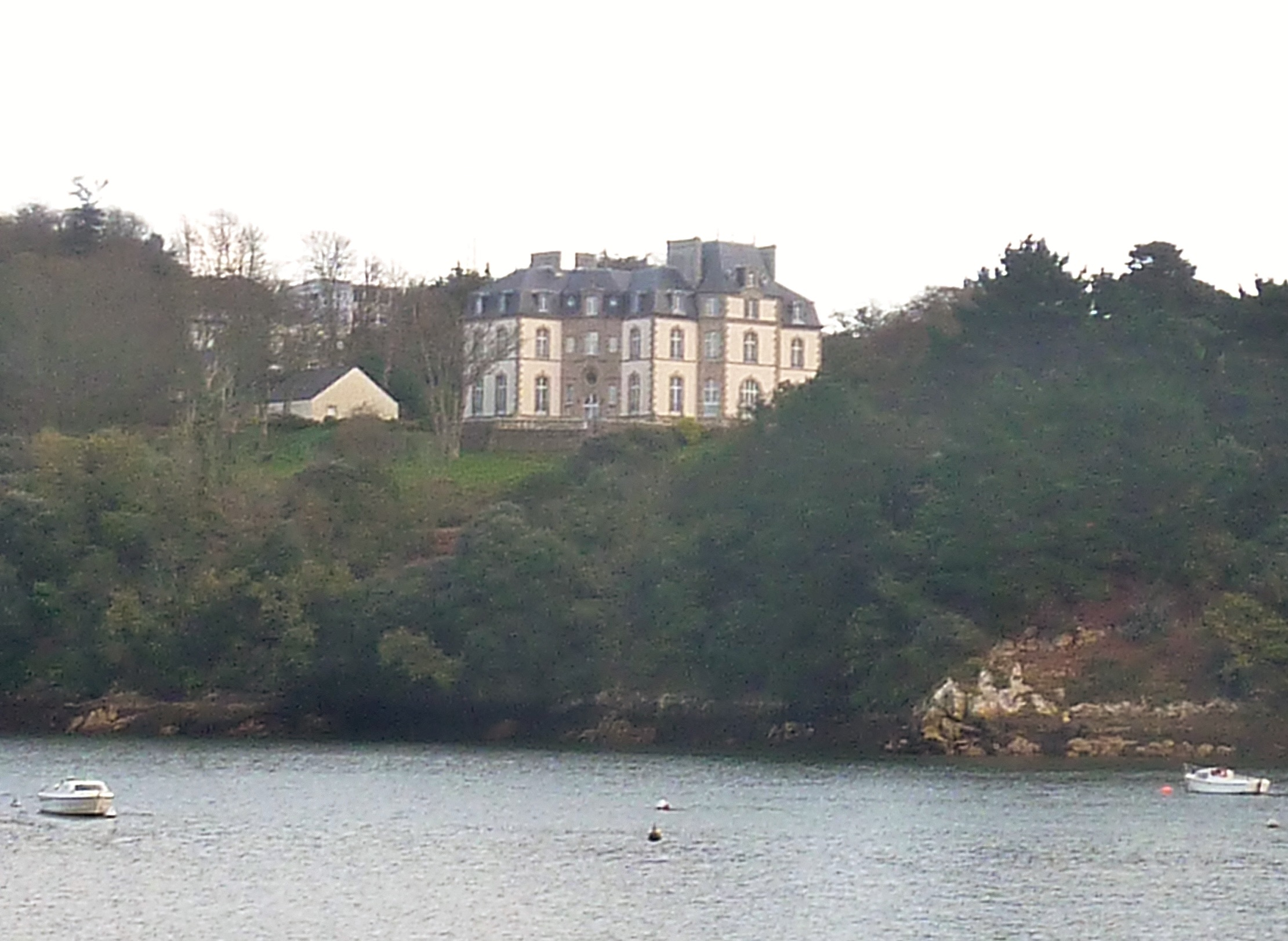 Le château de Locquéran vu depuis le sentier piétonnier de la rive droite de la ria du Goyen